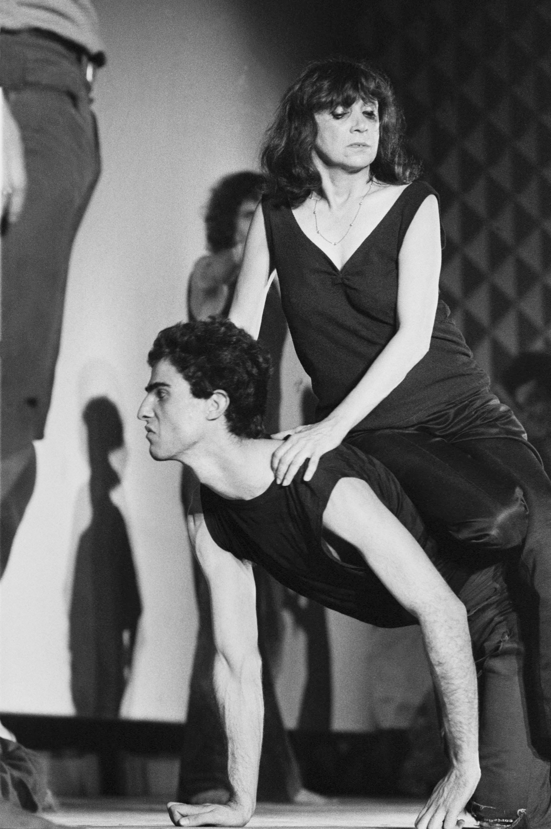 Judith Malina, fondatrice del Living Theatre di New York